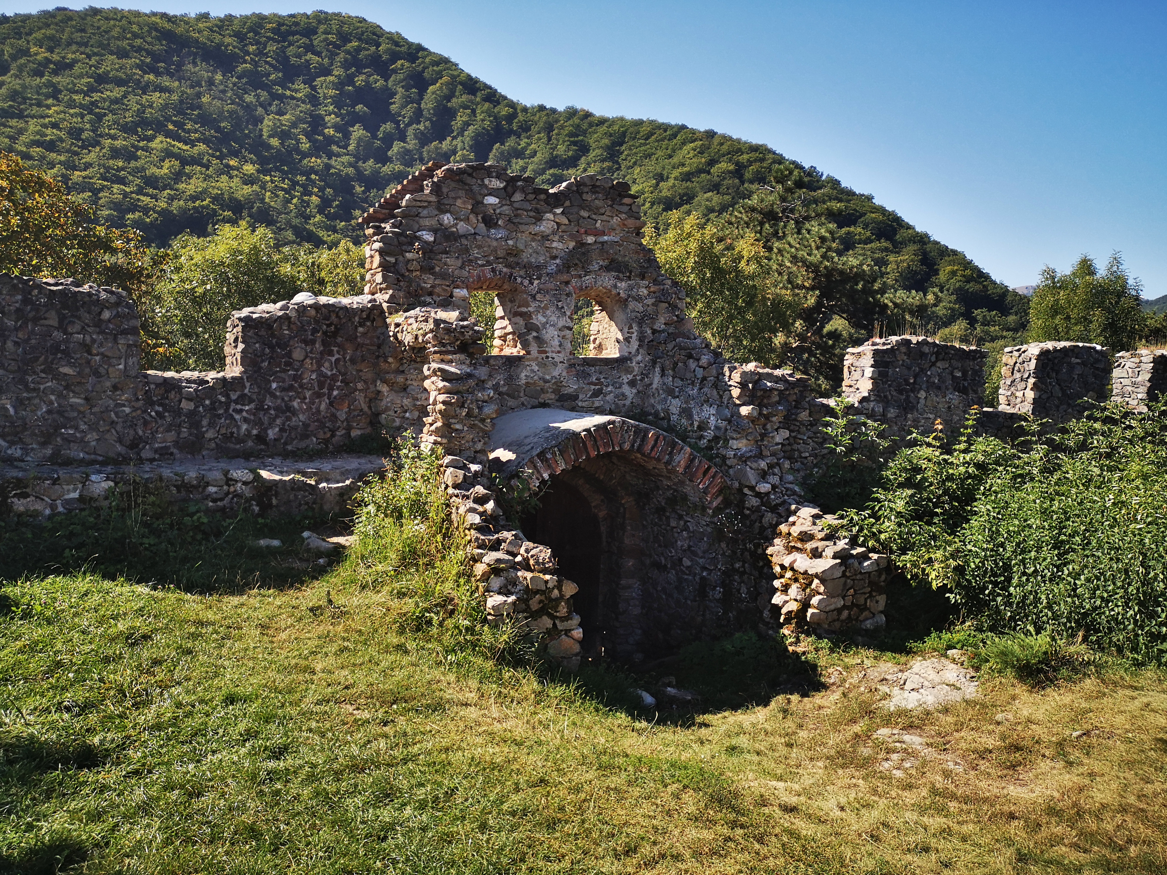 Ansamblul bisericii evanghelice „Sf. Mihail”